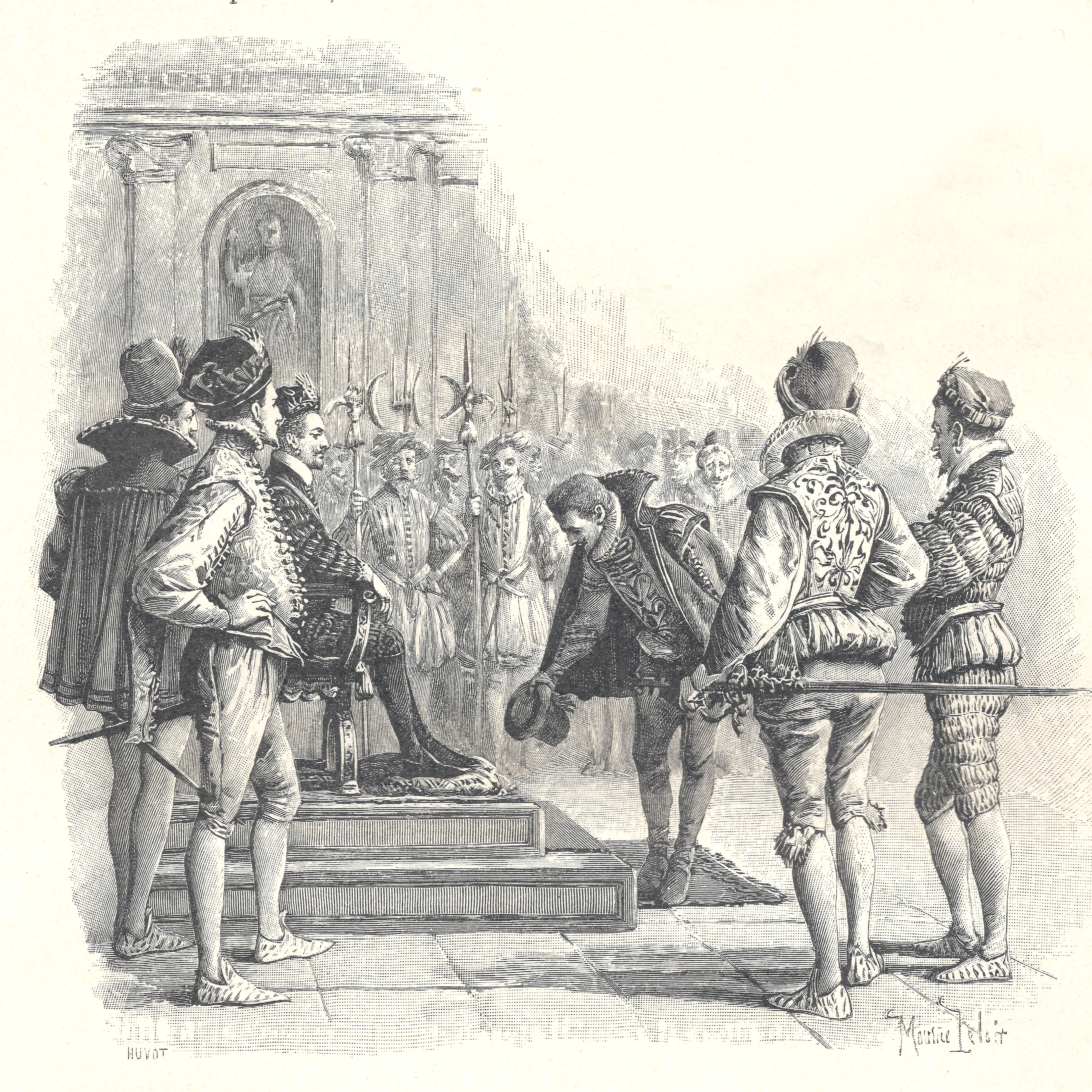 composition de Maurice Leloir et gravure sur bois de Jules Huyot se trouvant p.288 : Il s'avança droit à Henri, salua profondément et attendit.